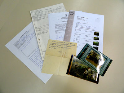 Documentos de catalogação de obras de arte